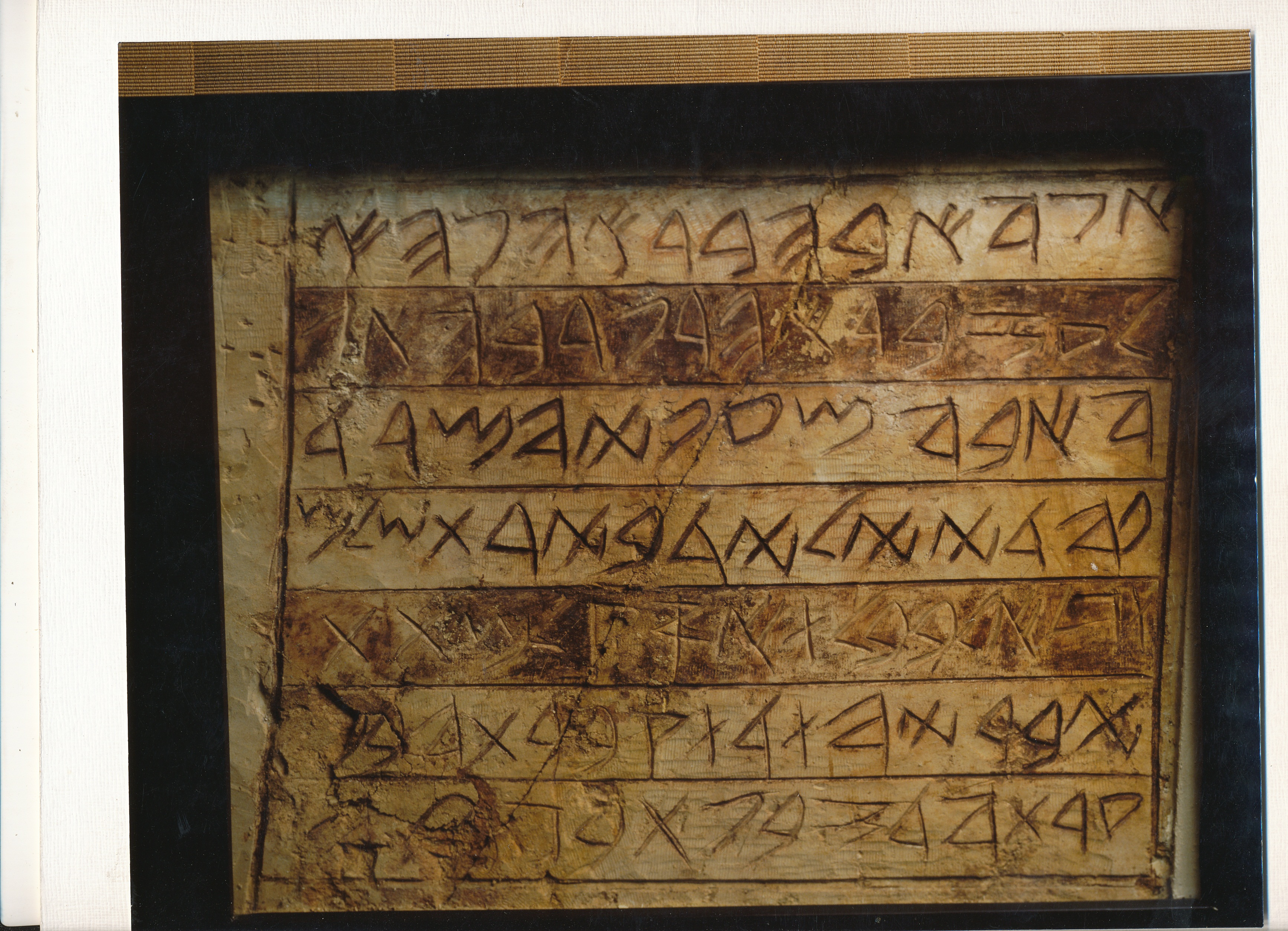 הכתובת ממערת אבה כפי שהיא מוצגת במוזיאון ישראל